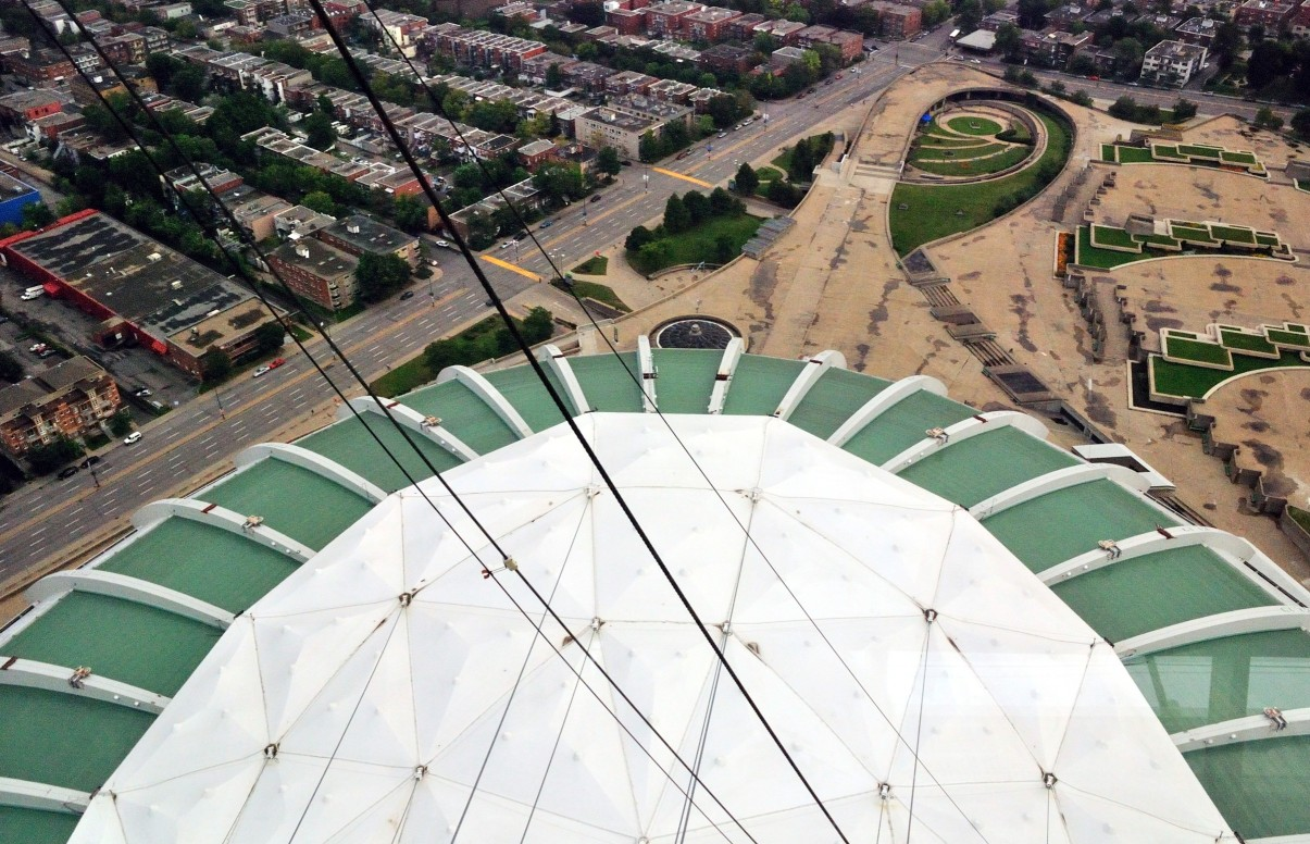 Stadiondach des Olympiastadions Montreal